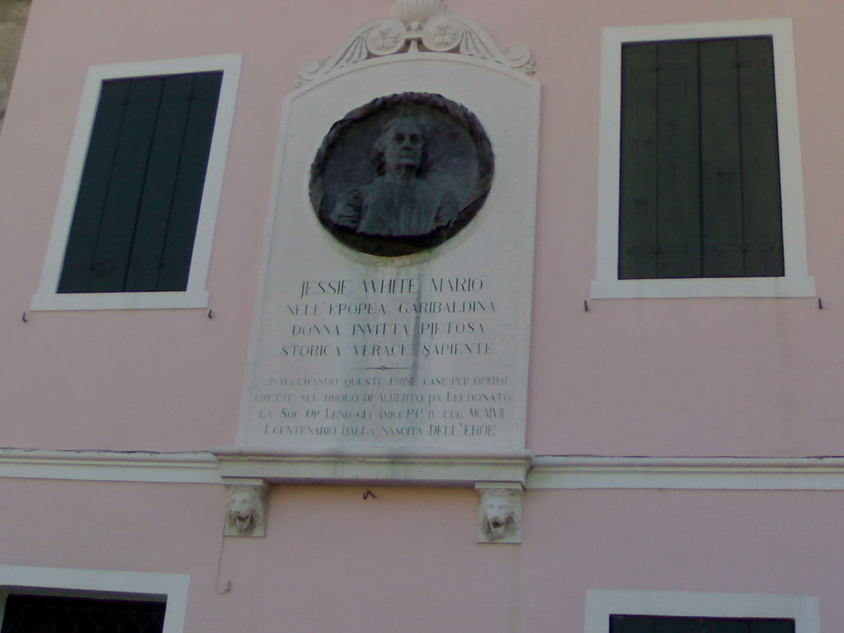 Targa commemorativa di Jessie White a Lendinara